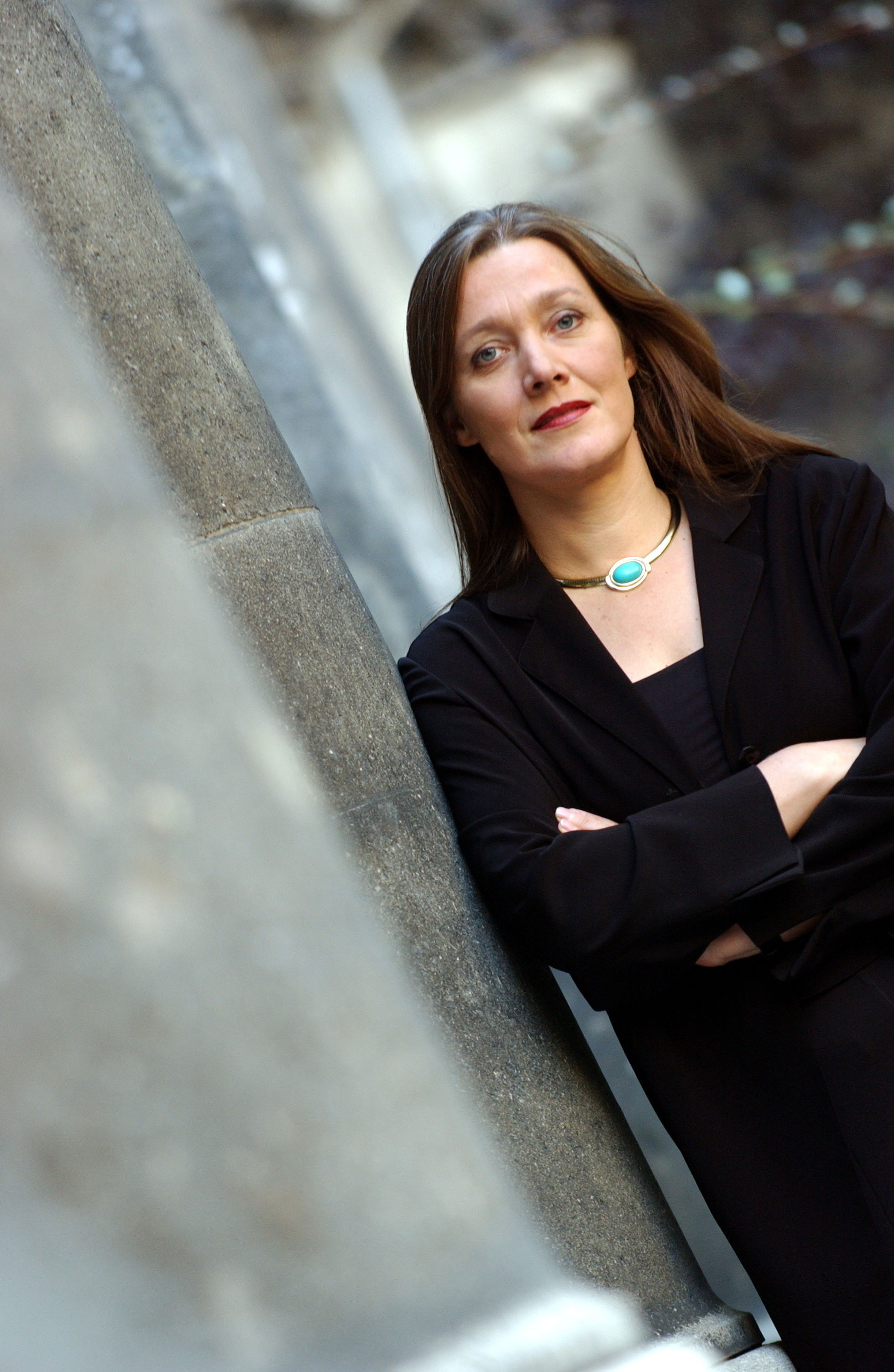 Sigrid Pilz. Wiener Landtagsabgeordnete und Mitglied des Wiener Gemeinderats (Die Grünen)